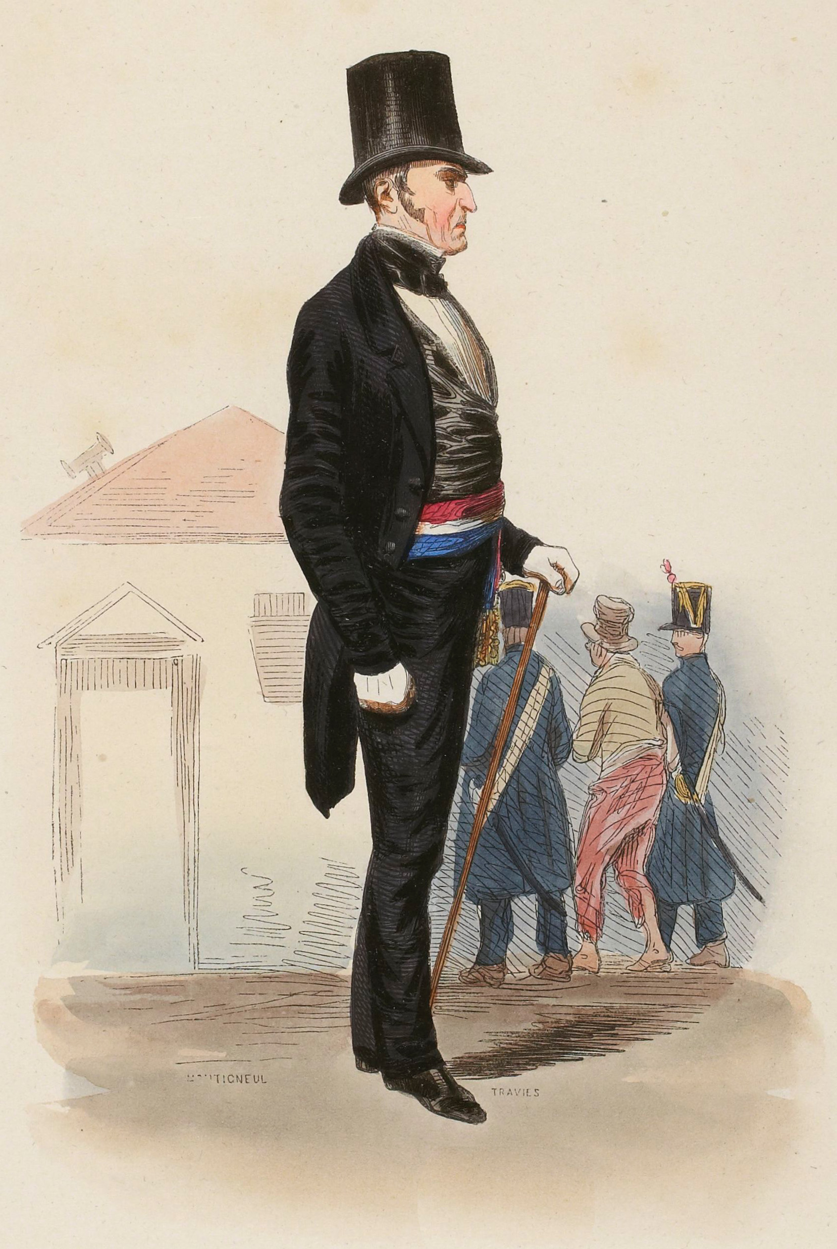 Un commissaire de police vers 1840. Gravure sur bois aquarellée à la main. Planche extraite de l'ouvrage Les Français peints par eux-mêmes : encyclopédie morale du dix-neuvième siècle, tome 3, Paris, L. Curmer, 1841.